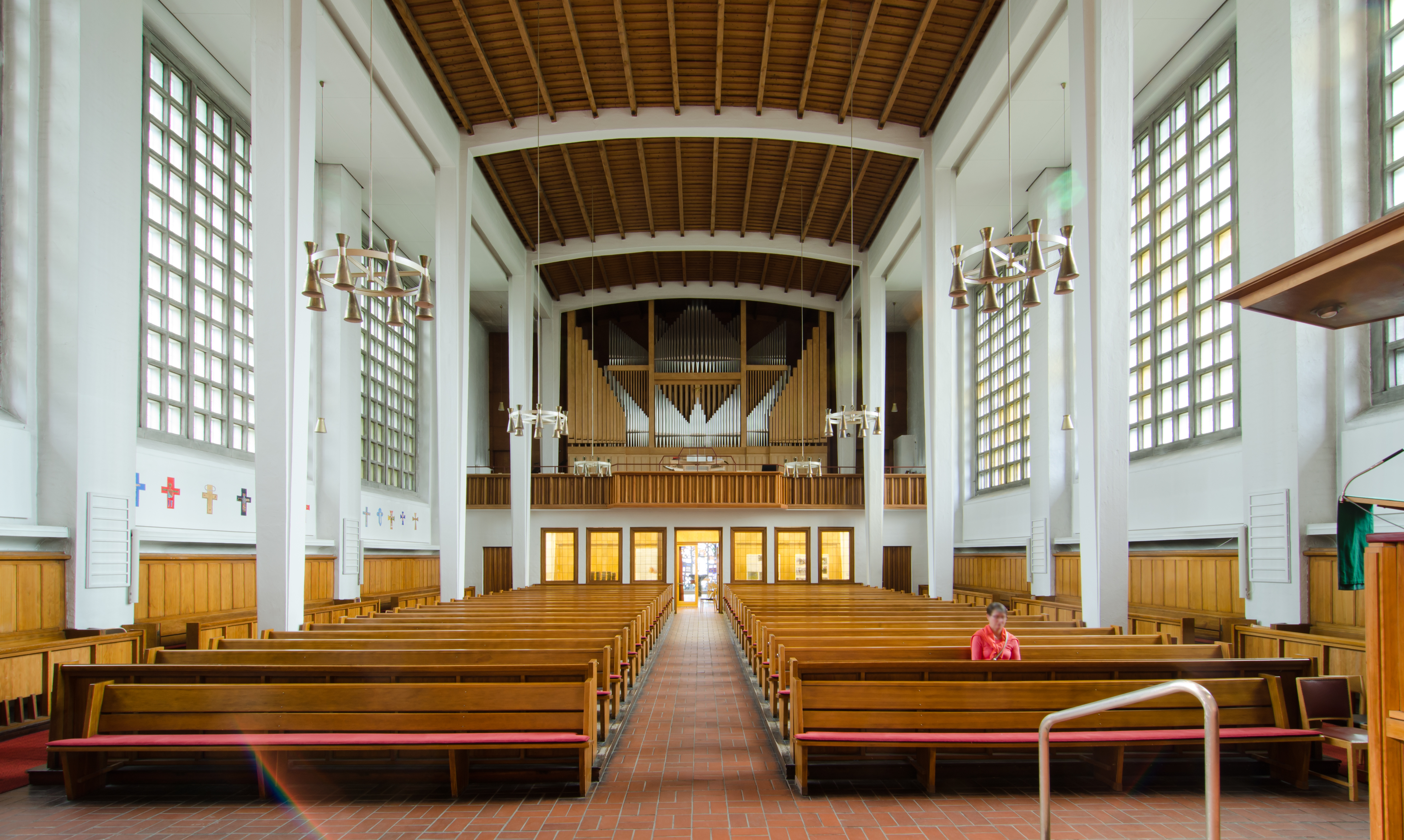 Hamburg-Wandsbek Christuskirche Blick Richtung Orgel